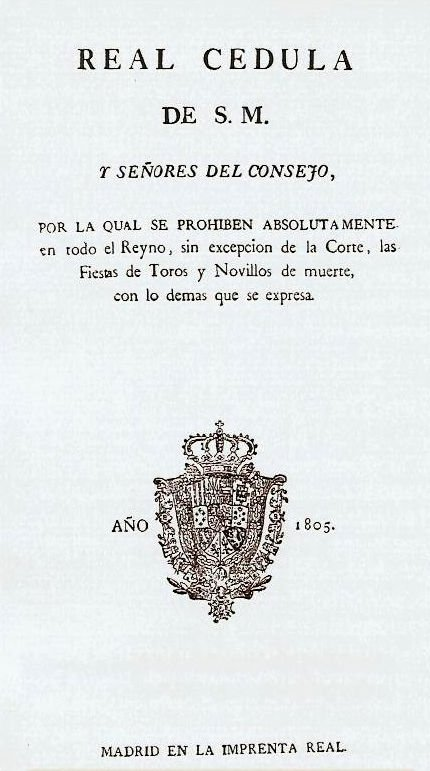 Cédula Real para prohibir los toros en España.